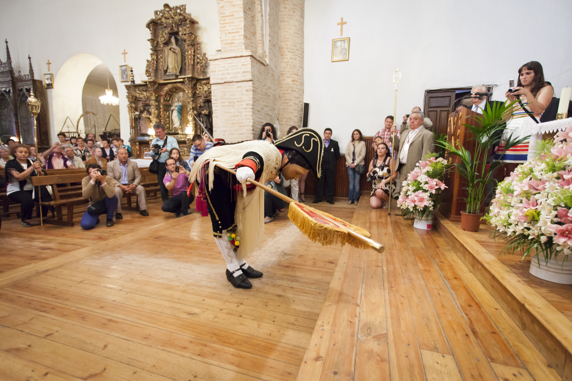 Corpus Christi en Laguna de Negrillos. León, España. Junio 2012. This is a photography of a Folklore festival in Spain (Wikidata id Q17627979).